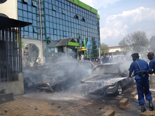 Une grenade a été lancée par des inconnus a explosé vendredi à l’extérieur du siège de la Banque commerciale Kenya à Bujumbura, Burndi, vendredi 29 mai 2015. (Edward Rwema, VOA)